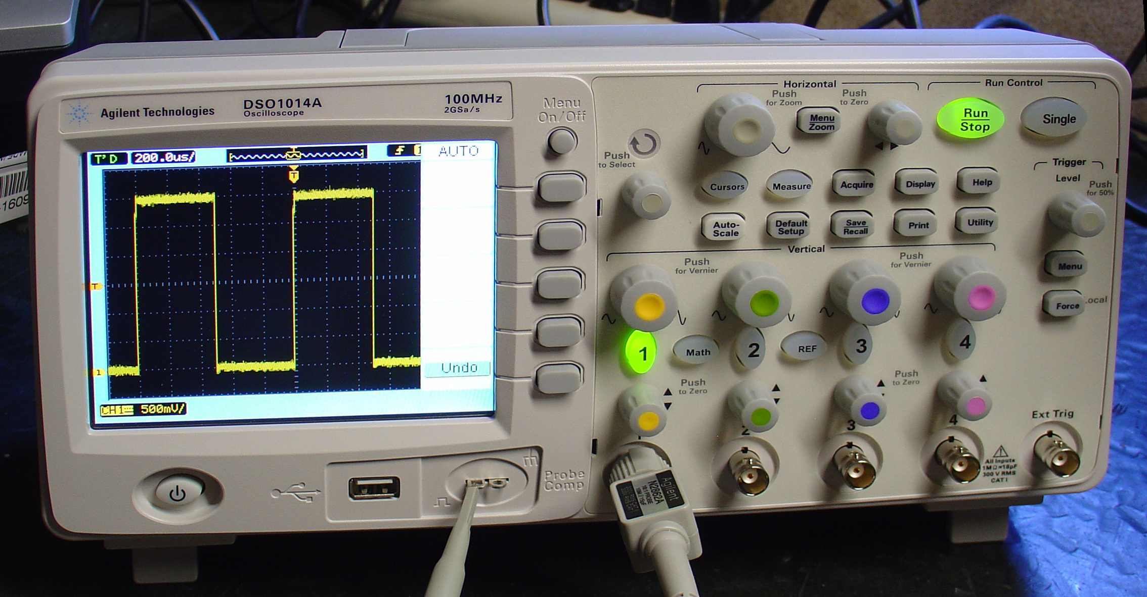 Probe cal - triggered.